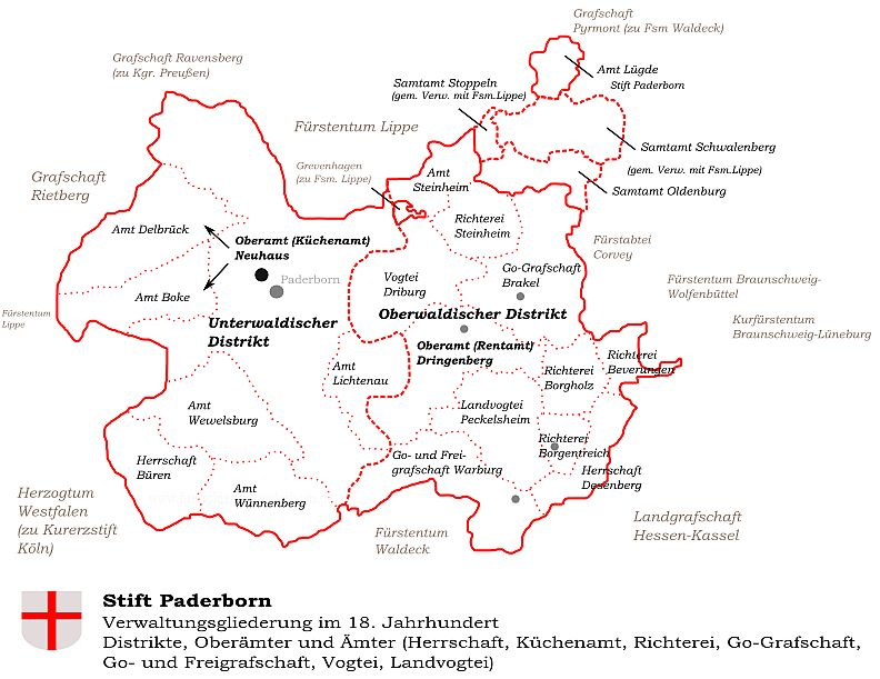 Fürstbistum Paderborn: Verwaltungsgliederung im 18. Jahrhundert Distrikte, Oberämter und Ämter (Herrschaft, Küchenamt, Richterei, Go-Grafschaft, Go- und Freigrafschaft, Vogtei, Landvogtei)